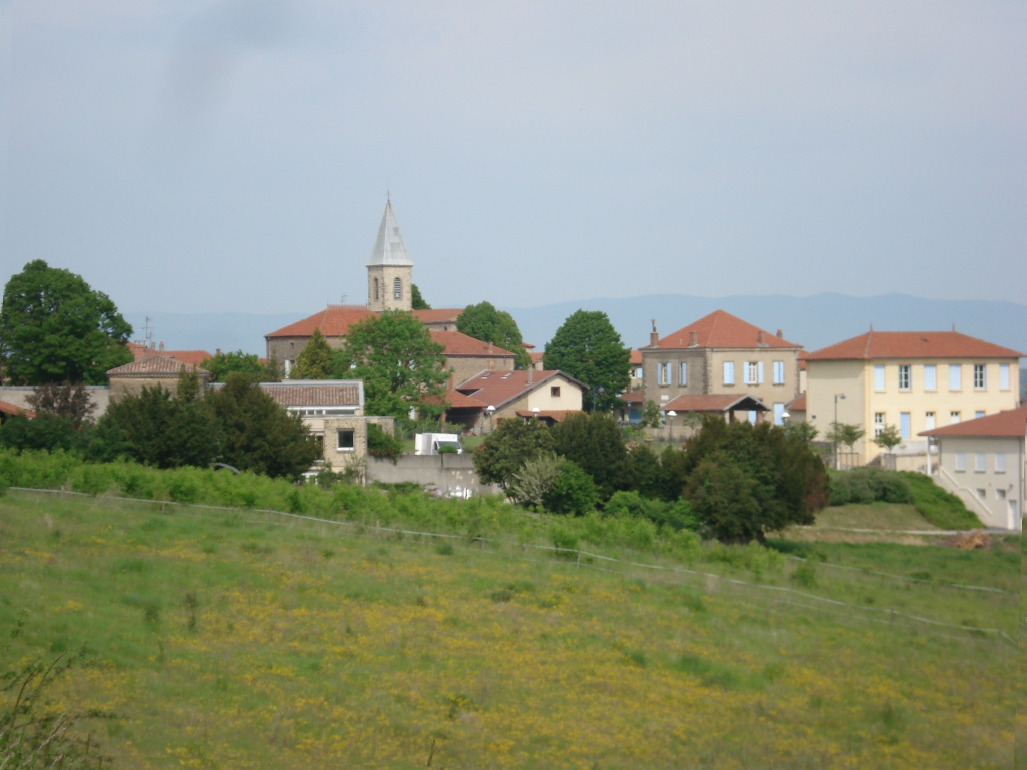 vue du village de Saint-Avit dans la Drôme des collines